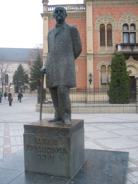 Опис: Споменик Јовану Јовановићу Змају у Новом Саду (Змај Јовина улица) Аутор: Ненад Шегуљев